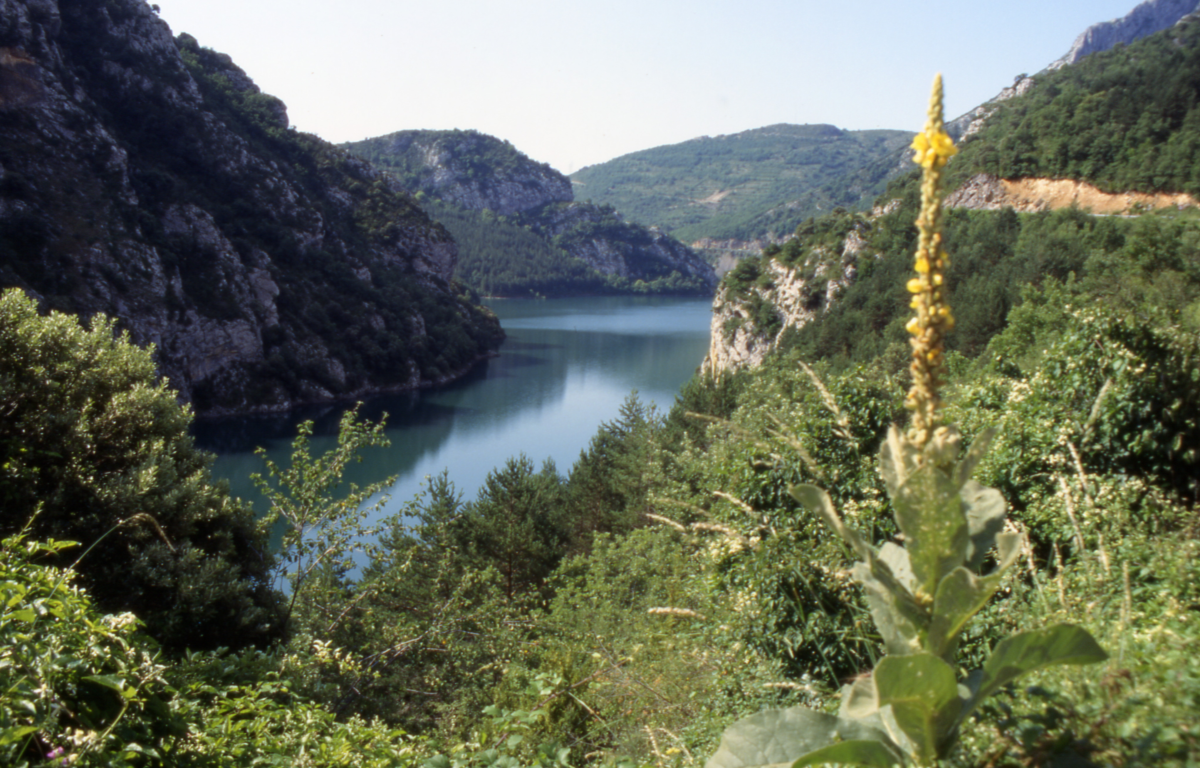 VielhaEMijaranLandschaft